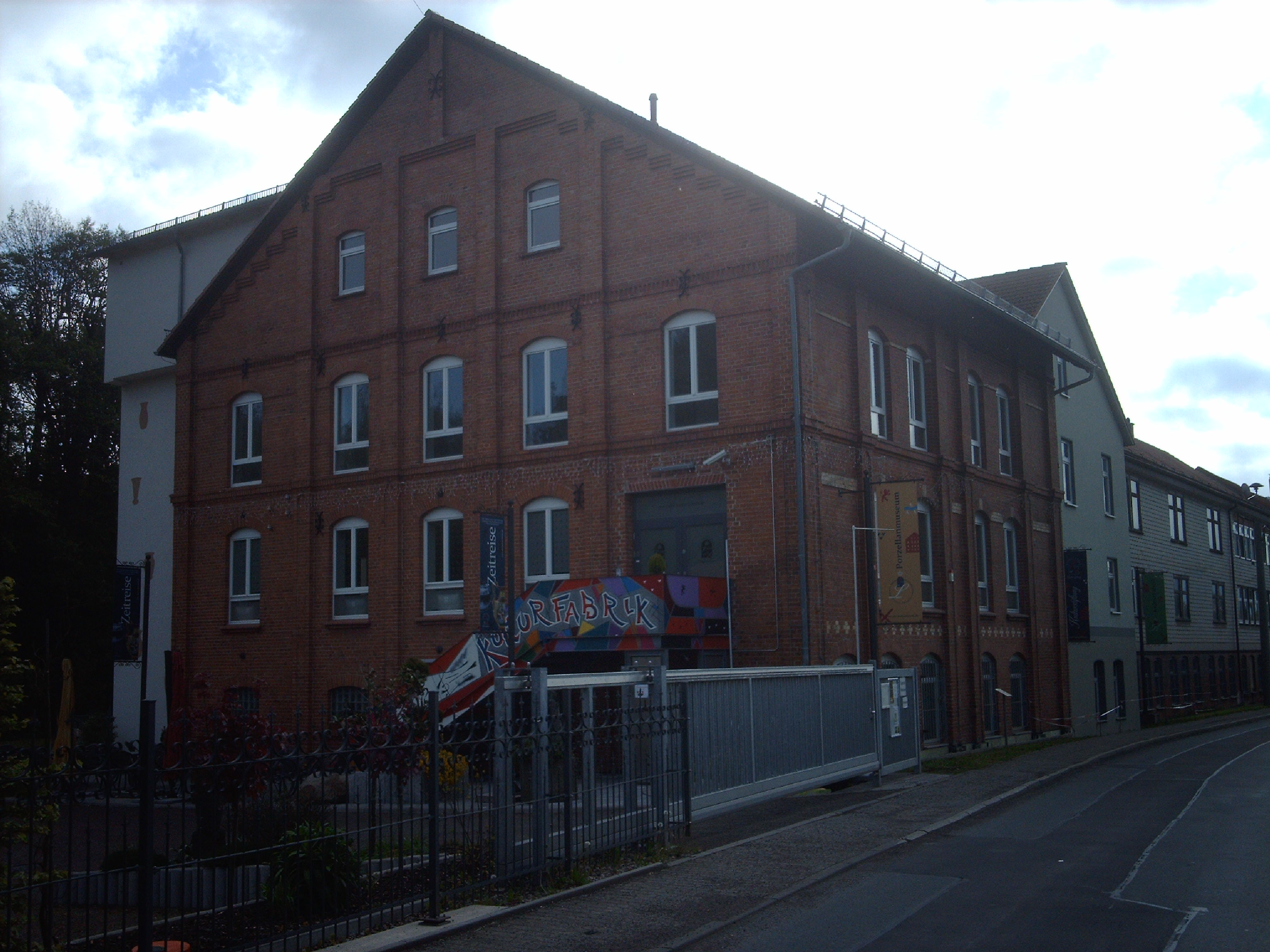 Die Kulturfabrik in Langewiesen in einer ehemaligen Porzellanfabrik.